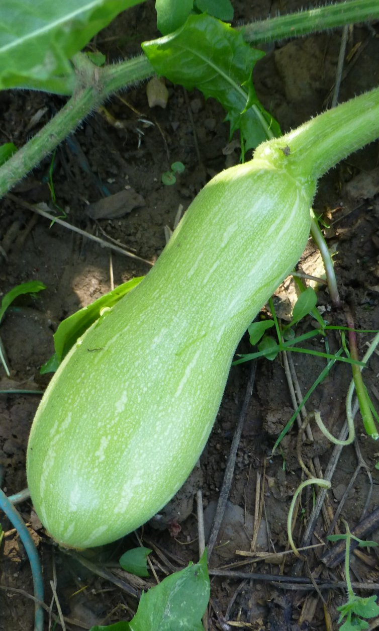 Cucurbita moschata violina. Butternut group.